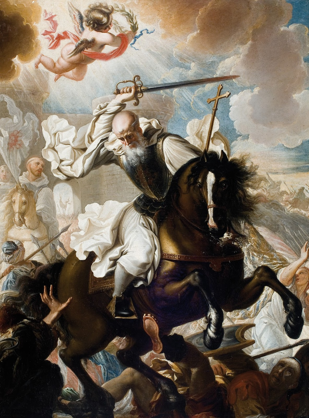 San Raimundo de Fitero en la defensa de Calahorra, Calahorra, parroquia de San Andrés